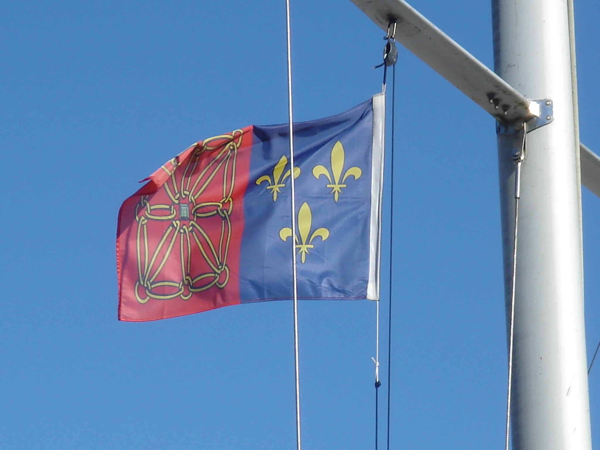 Pavillon aux armes de France et de Navarre (anciennes armes du royaume de France) actuellement armes du port et de la ville de Palais à Belle-île-en-Mer.